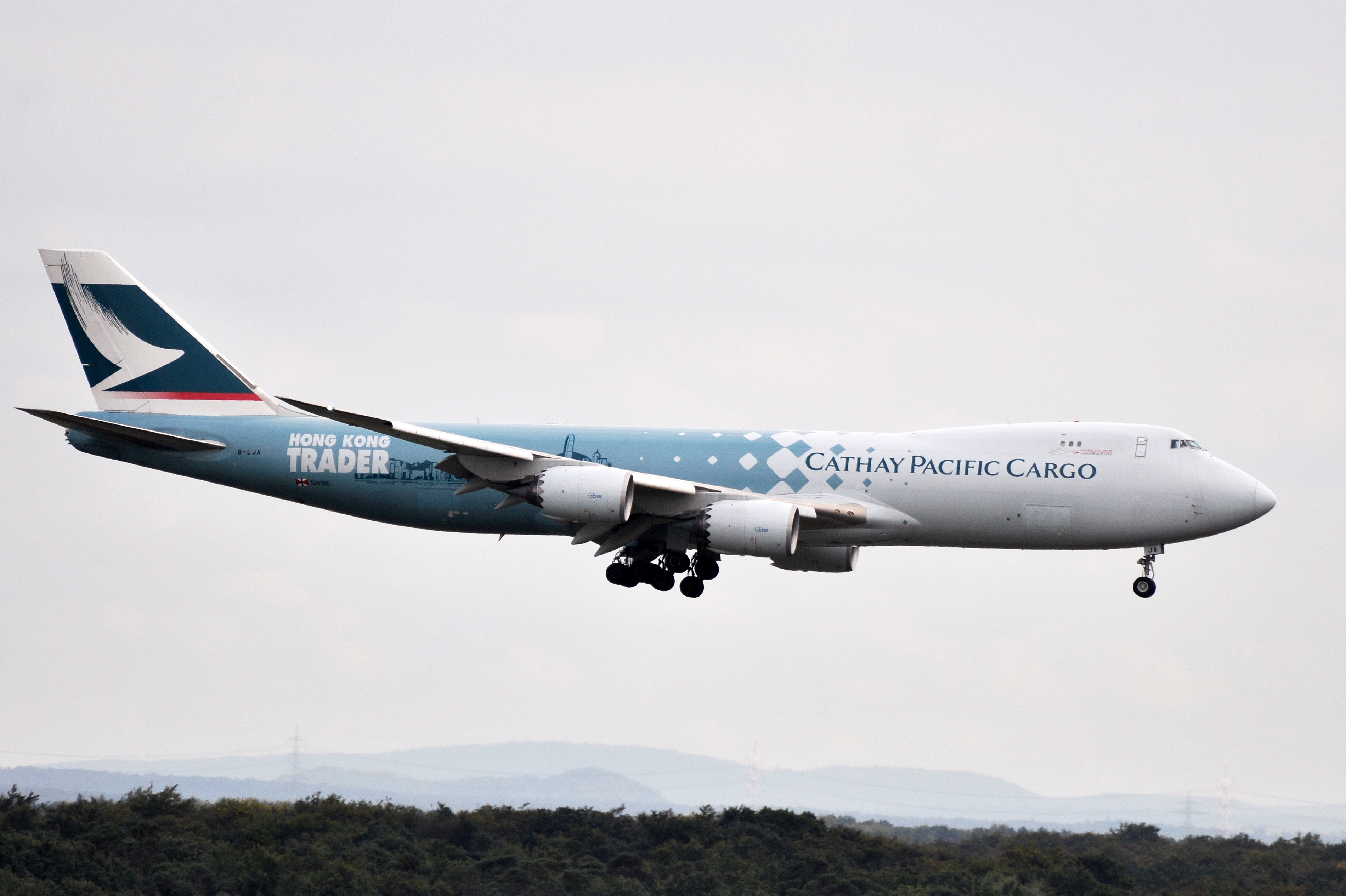 MSN 39238 LN 1427 B747-867F CATHAY PACIFIC FRA